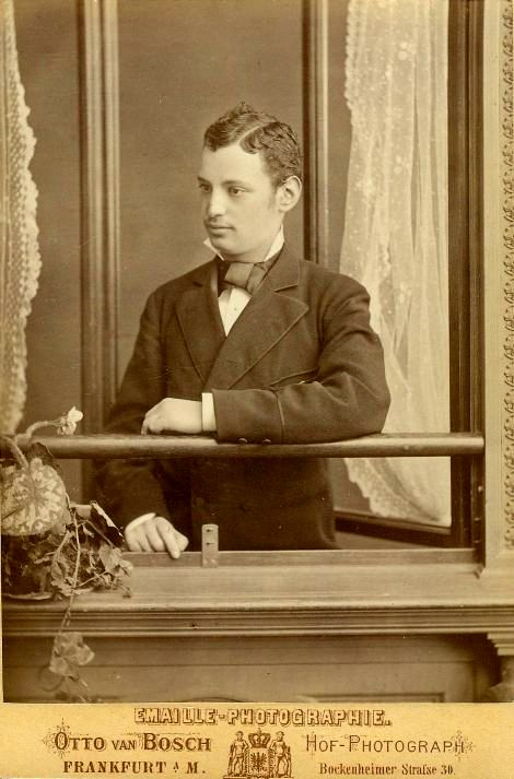 Alfred Karl Mayer, deutsch-jüdischer Kunst- und Literaturkritiker, Mäzen in seiner Frankfurter Zeit